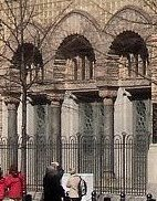 Ausschnitt aus dem Bild der Synagoge